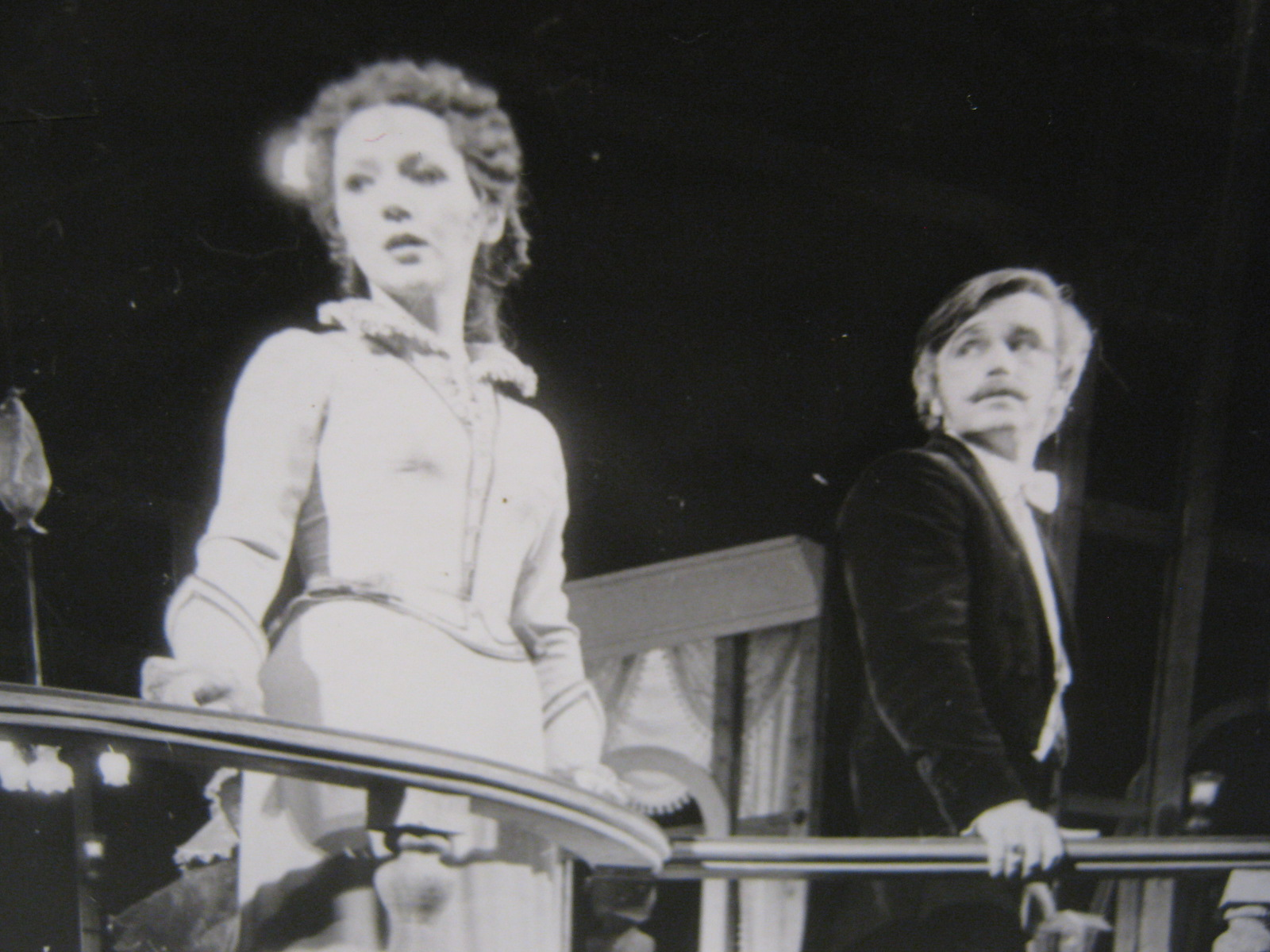 Сцена из спектакля «Женитьба Белугина» Н. Попова в роли Елены, А. Арефьев в роли Агишина, режиссёр-постановщик Егоров Геннадий Семёнович